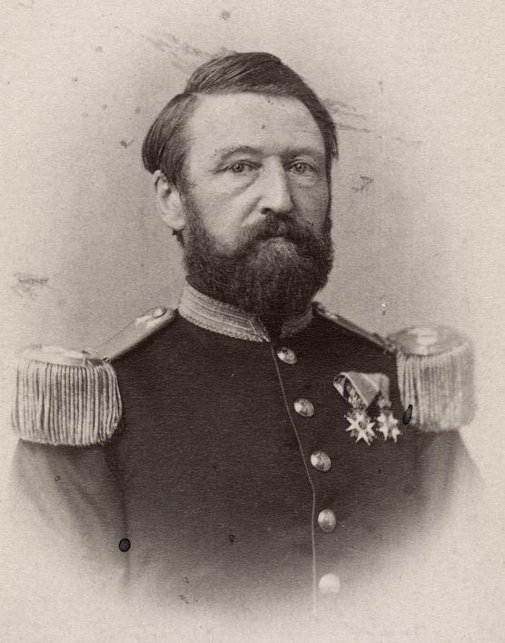 Joseph Frantz Oscar Wergeland, portrett, mann, generalmajor, uniform, vignettert brystbilde.